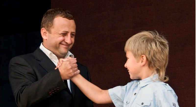 добрі справи В. Яніцького